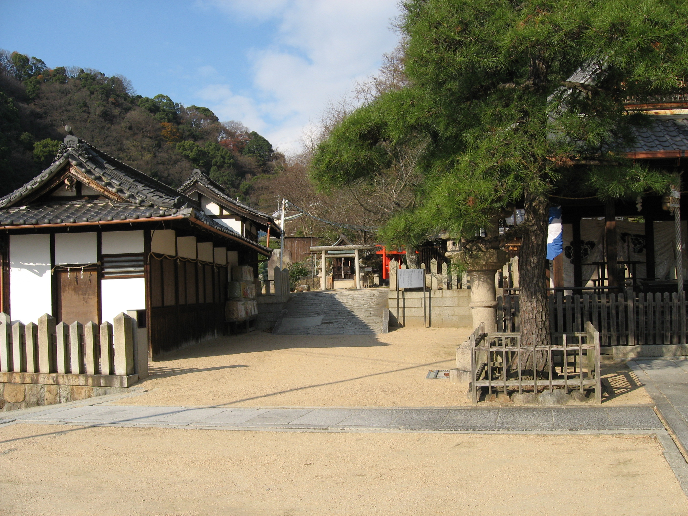 神戸 祇園神社境内